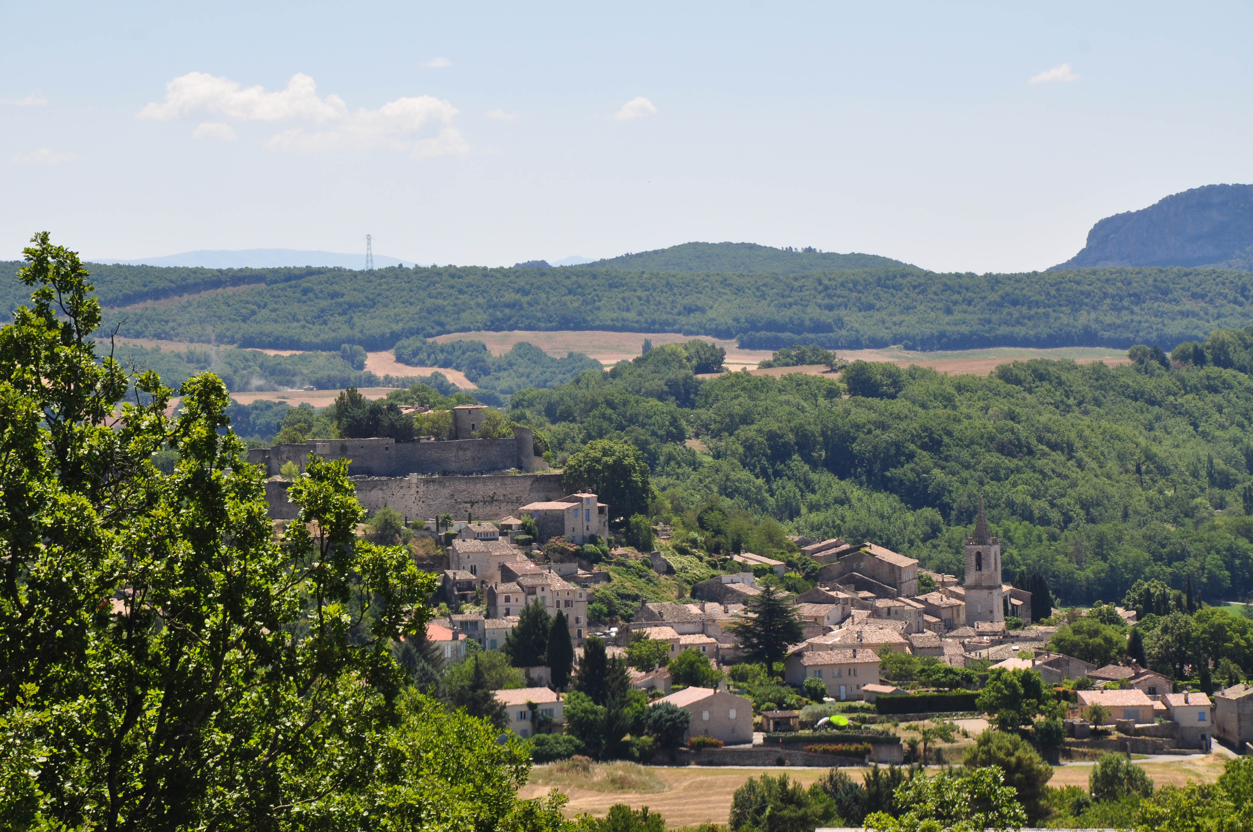 Vue générale du village